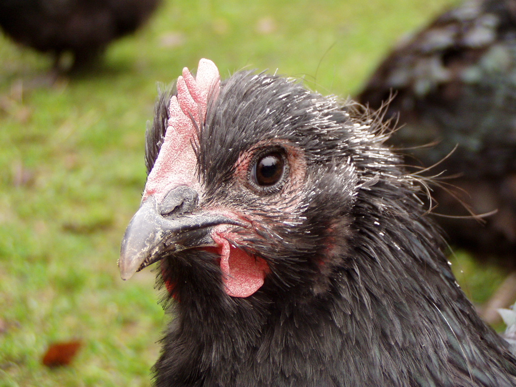 Een Orpington-hen in de rui. Foto gemaakt door Rex. Categorie:Afbeelding kip